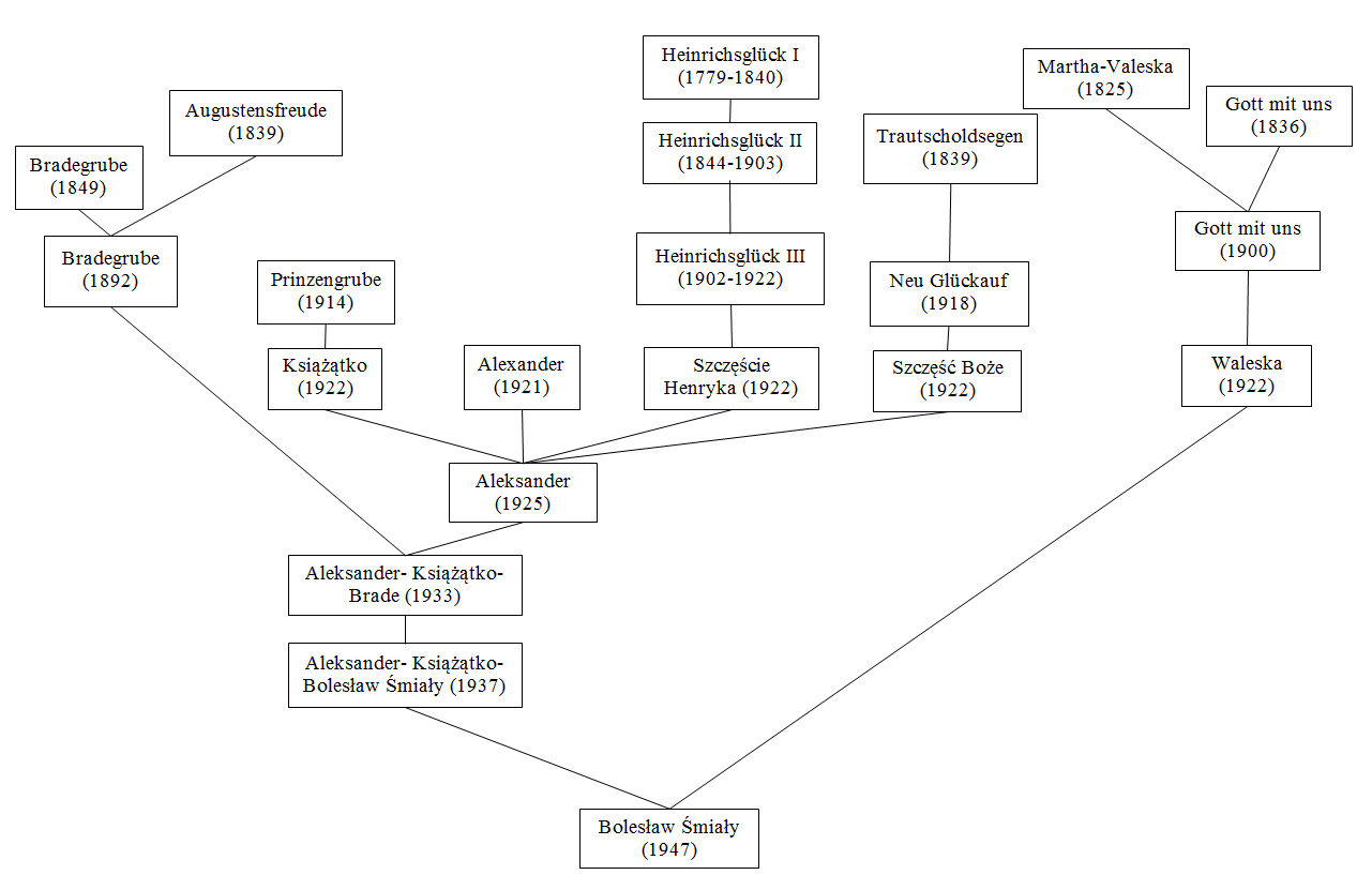 Ergänzung der alten Abstammungsdatei